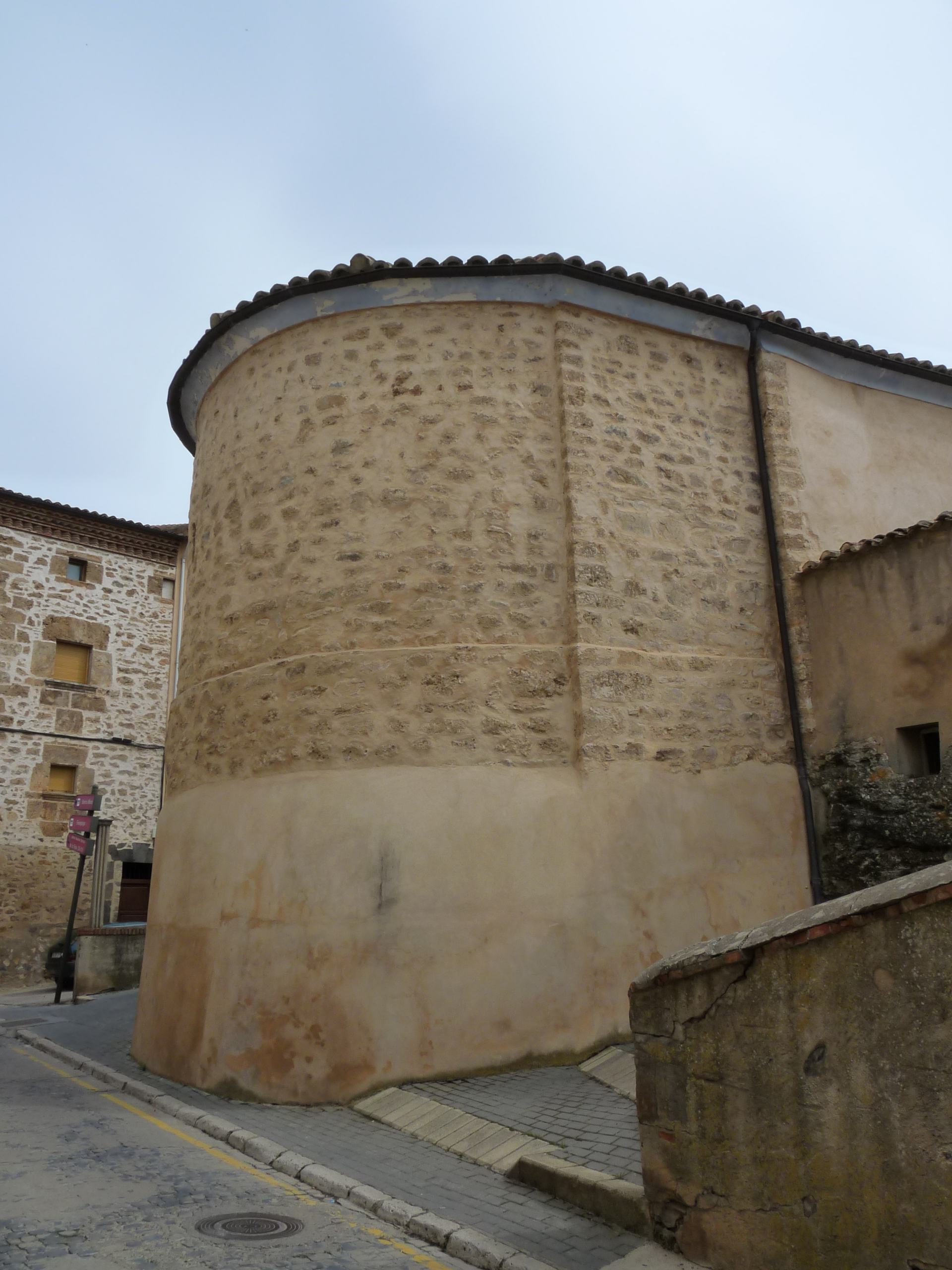 Ágreda - Iglesia románica del siglo XII, construida sobre una antigua sinagoga judía